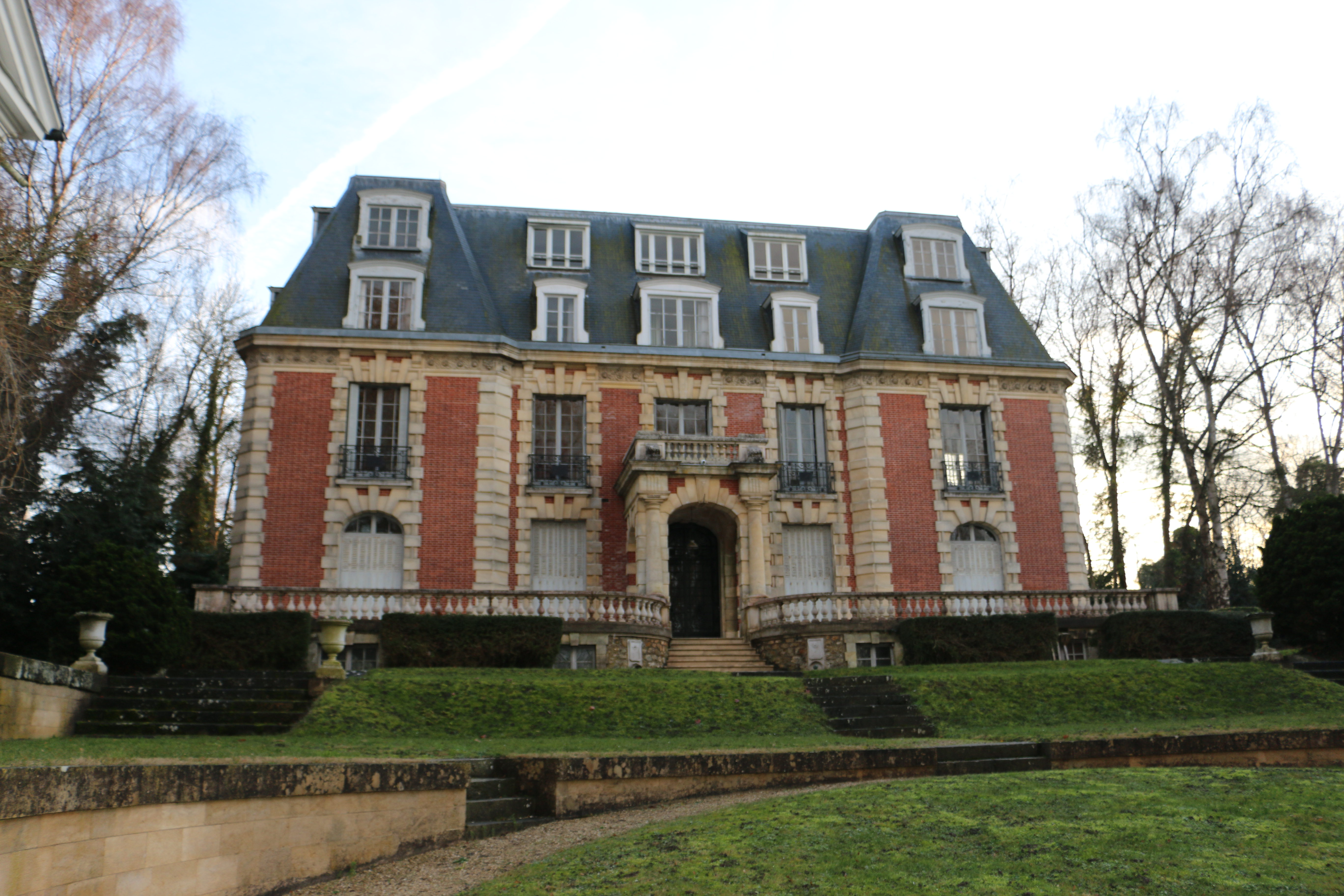 CHATEAU DES VIVES-EAUX